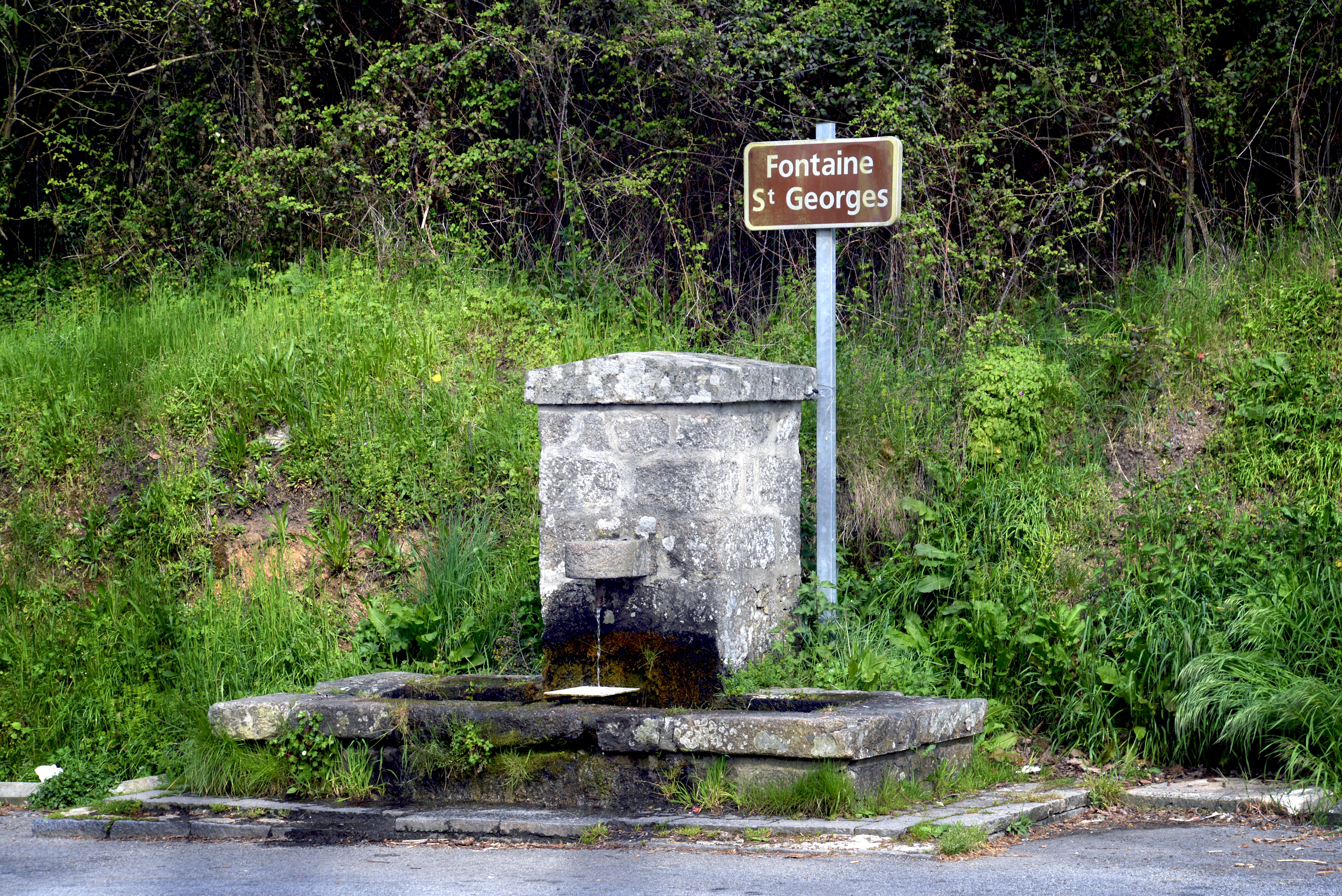 Grosseto-Prugna, Taravo (Corse-du-Sud) - La fontaine Saint-Georges au col du même nom, en bordure de la route territoriale 40 (ex RN 196).